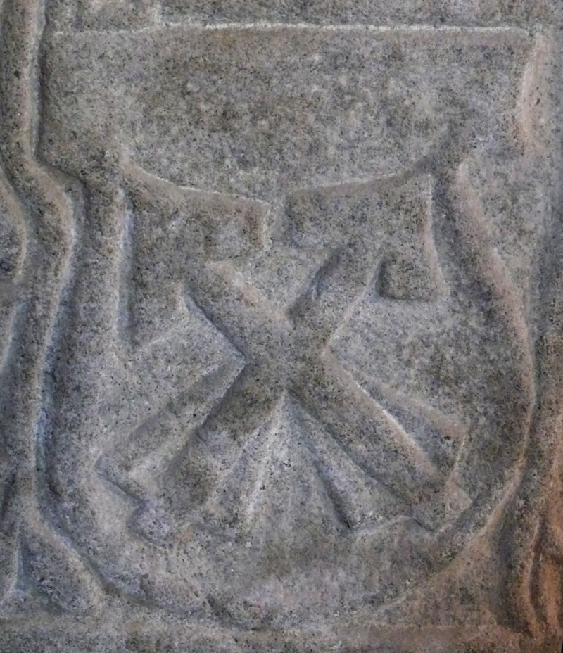 Erb pánů z Pořešína na náhrobku Moniky z Pořešína zesnulé roku 1529. Kostel sv. Václava v Bubovicích, okres Příbram.